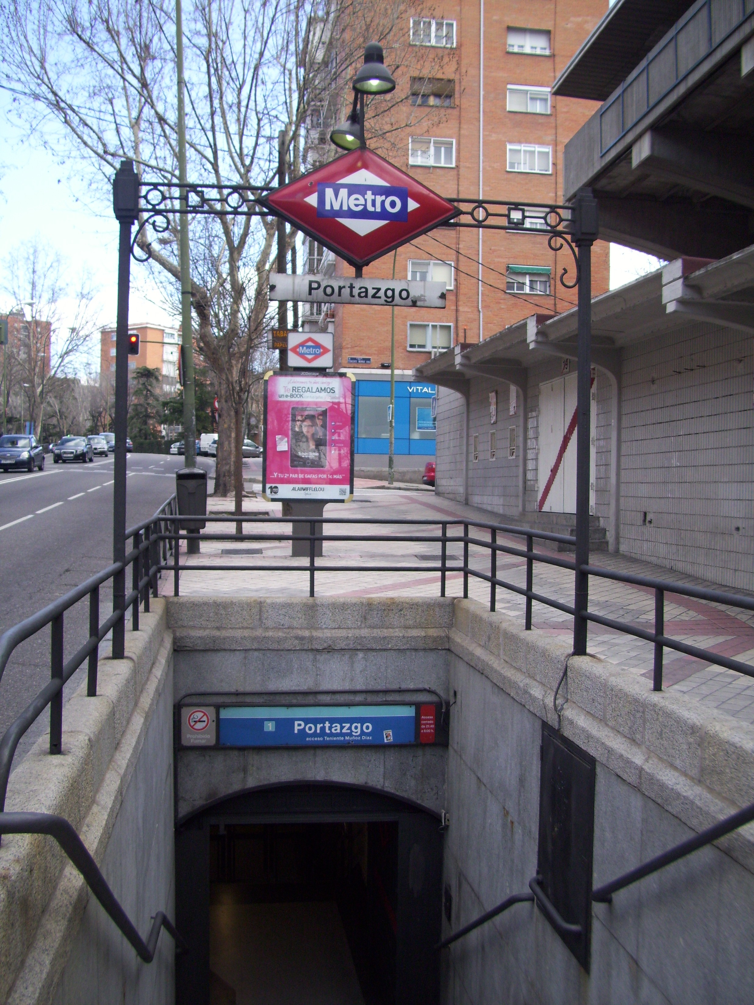 Portazgo (metropolitana di Madrid)